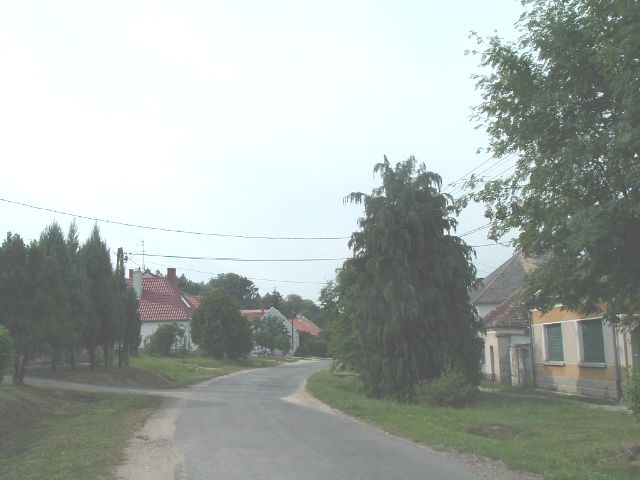 Street in Tömörd, Hungary